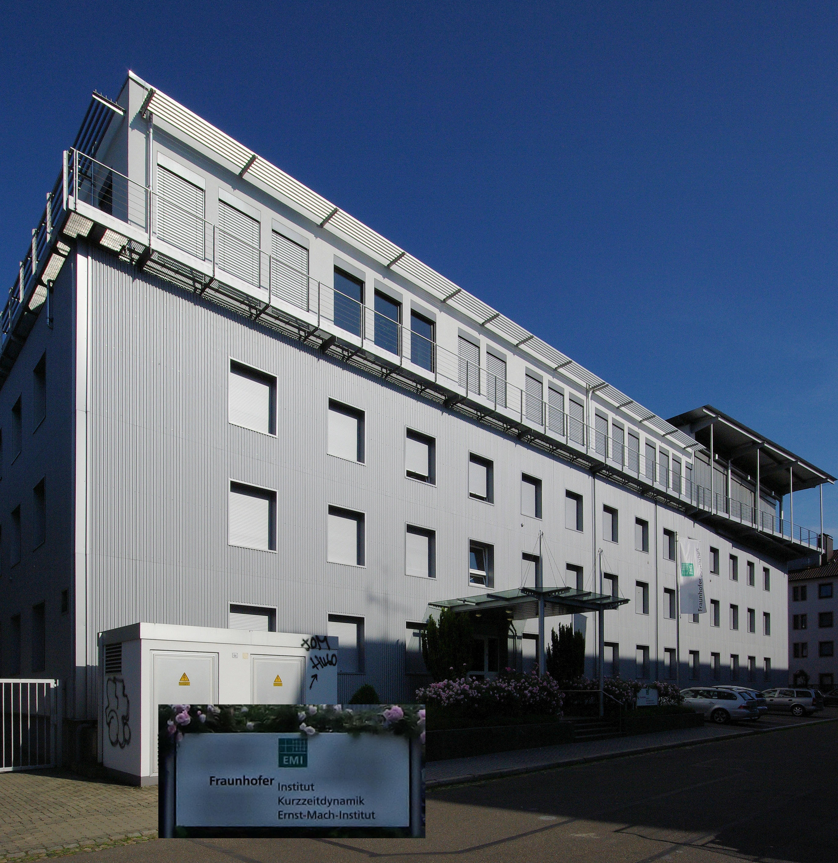 Das Fraunhofer-Institut für Kurzzeitdynamik